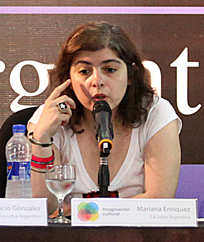 Buenos Aires, 7 de noviembre de 2014 Se desarrolló en el Centro Cultural "Paco Urondo" la segunda jornada del encuentro de escritores "La letra argentina. Lenguajes, política y vida en el siglo XXI", organizado por el Ministerio de Cultura de la Nación y la Facultad de Filosofía y Letras de la Universidad de Buenos Aires (UBA). La mesa "Los géneros populares" estuvo encabezada por Horacio González, Mariana Enríquez, Marcelo Figueras y Juan Diego Incardona y moderada por Francisco "Teté" Romero. Fotos: Silvina Frydlewsky / Ministerio de Cultura de la Nación